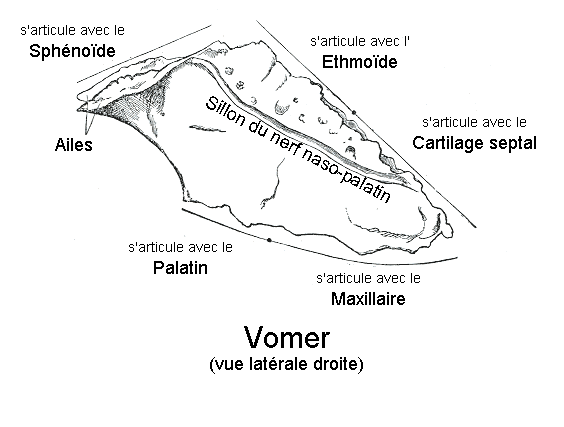 Vomer.Face latérale. Anatomie humaine